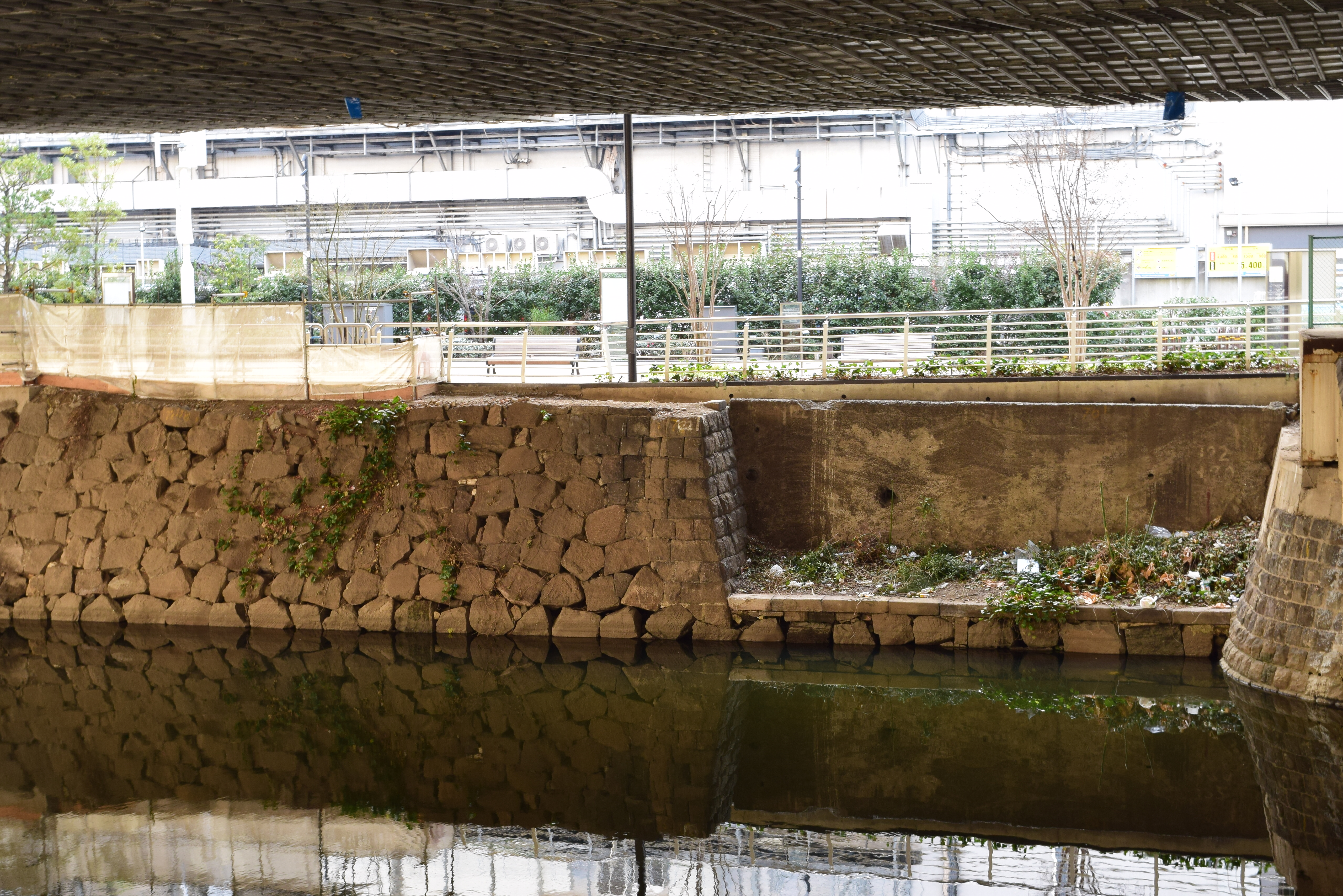 日本橋川の鎌倉河岸の遺構。 2019年2月撮影。